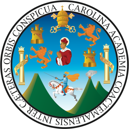 La Universidad del Reyno de Guatemala, fue fundada por Real Cédula emitida por el Rey de España don Carlos II, el 31 de enero de 1676. Debe citarse como precursores de la misma, el Obispo Francisco Marroquin y don José Crespo Suárez. El Escudo consta de dos círculos concéntricos, en medio de los cuales se lee "CAROLINA ACADEMIA COACTEMALENSIS INTER CAETERAS ORBIS CONSPICUA", cuya traducción sería: UNIVERSIDAD DE GUATEMALA GRANDE ENTRE LAS DEL MUNDO".